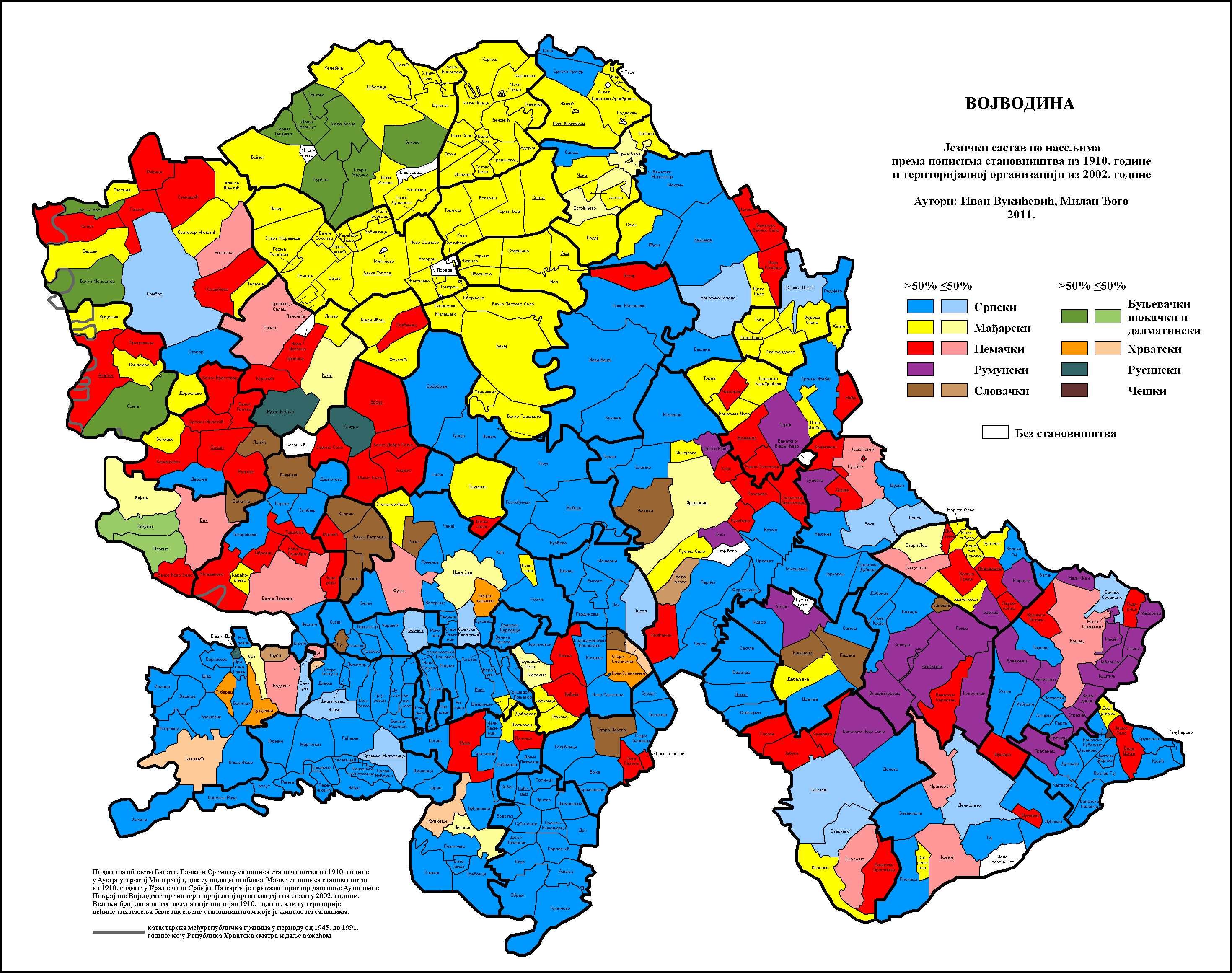 Језички састав Војводине по насељима 1910. године. Аутори: Иван Вукићевић - , Милан Ђого